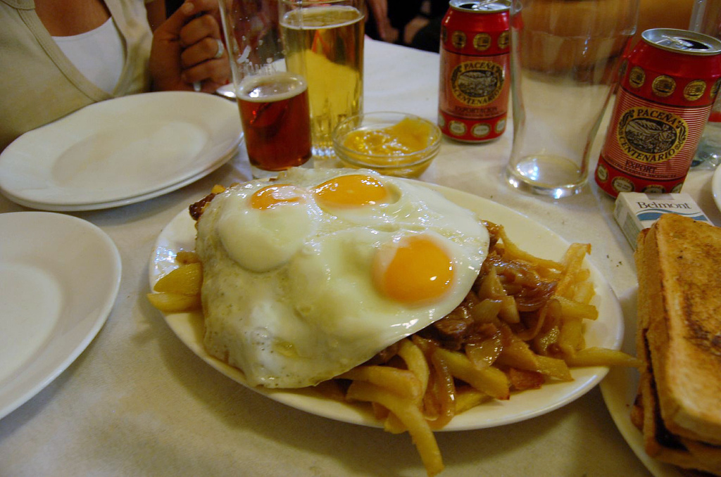 Turismo Chile en Valparaíso.Octubre 2007 562